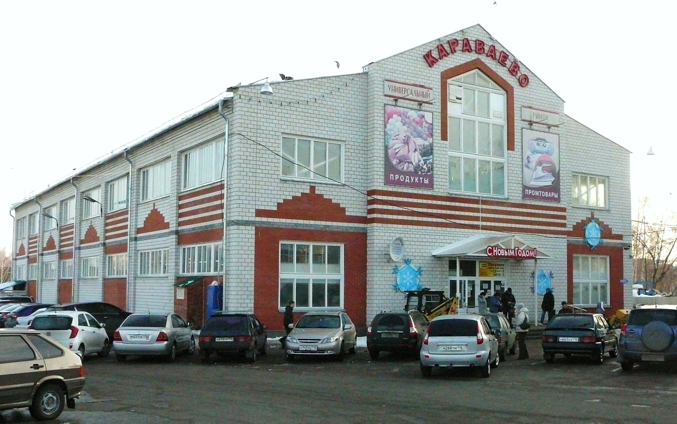 Торговый комплекс "Караваево" в "посёлке Караваево" (г. Казань, Авиастроительный район).